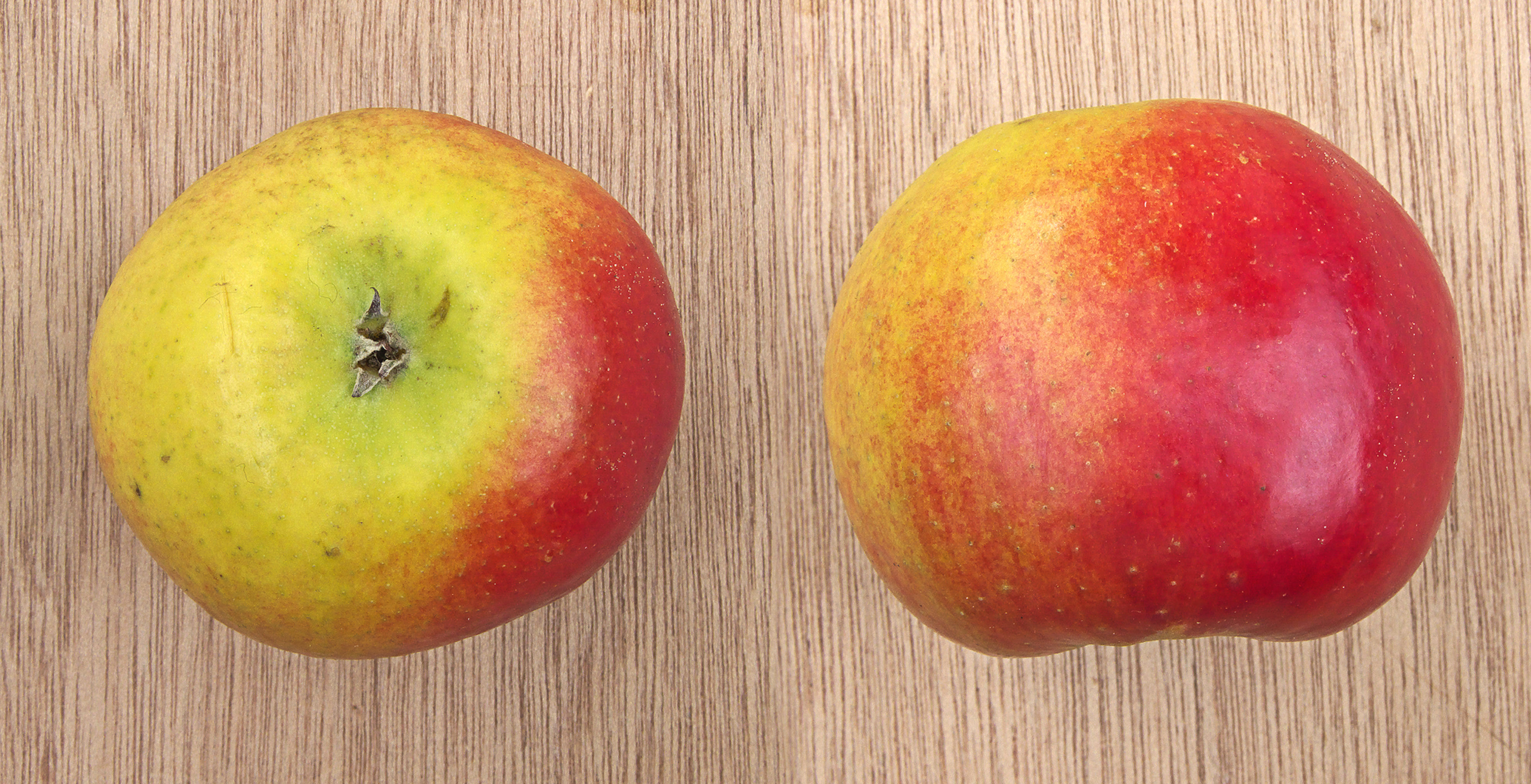 Junami, appelras